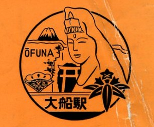 大船駅観光スタンプ